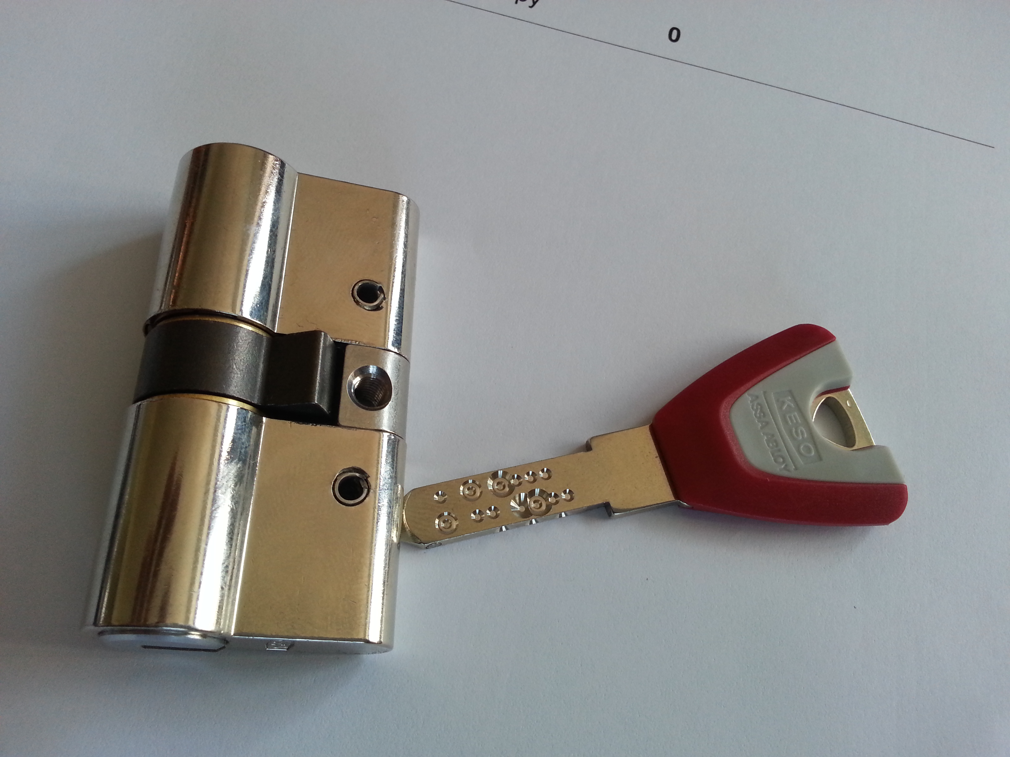 Keso cilindrični vložek in ključ. Cilinder standardnih dimenzij 30/30.